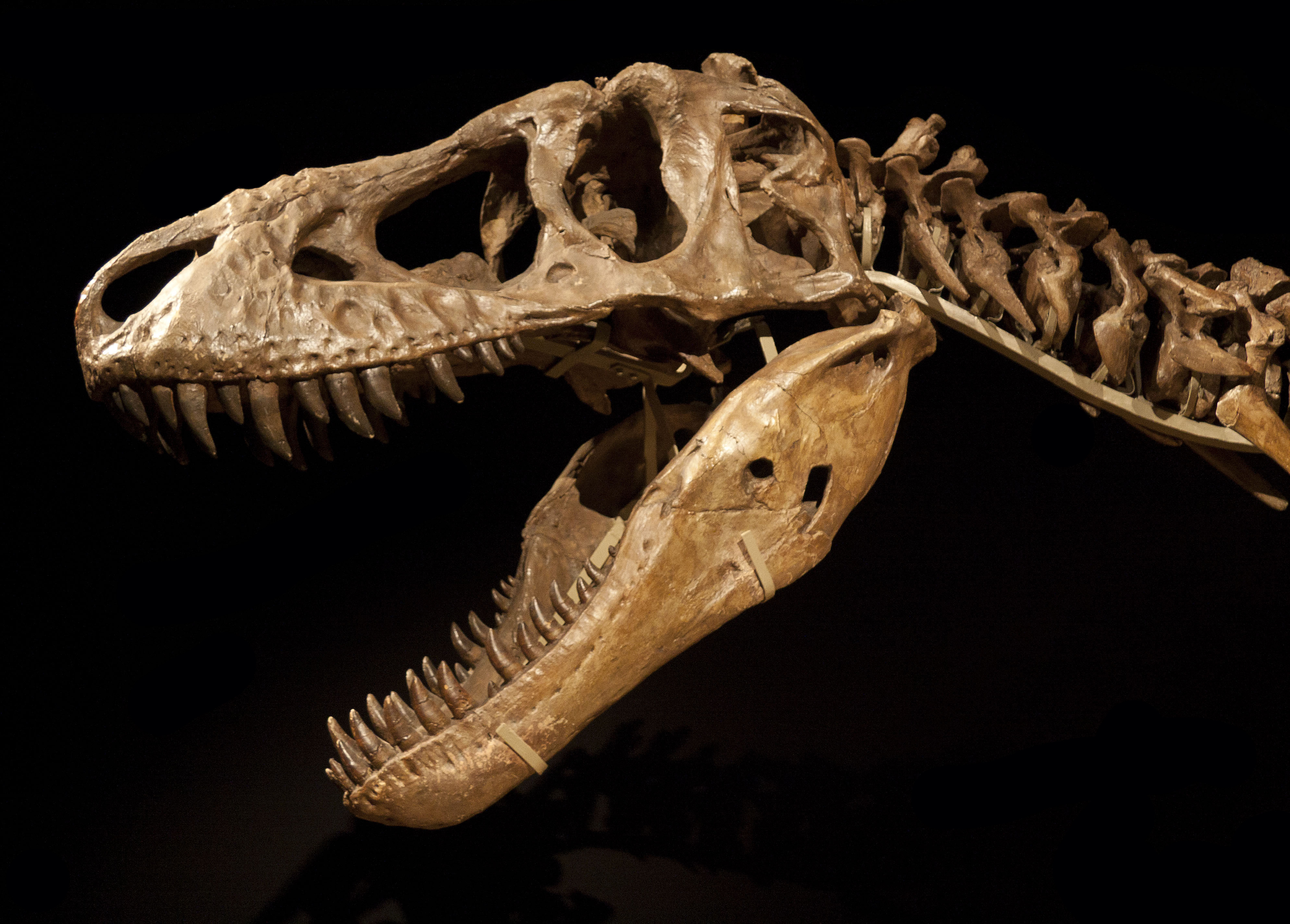 IMG_1252'